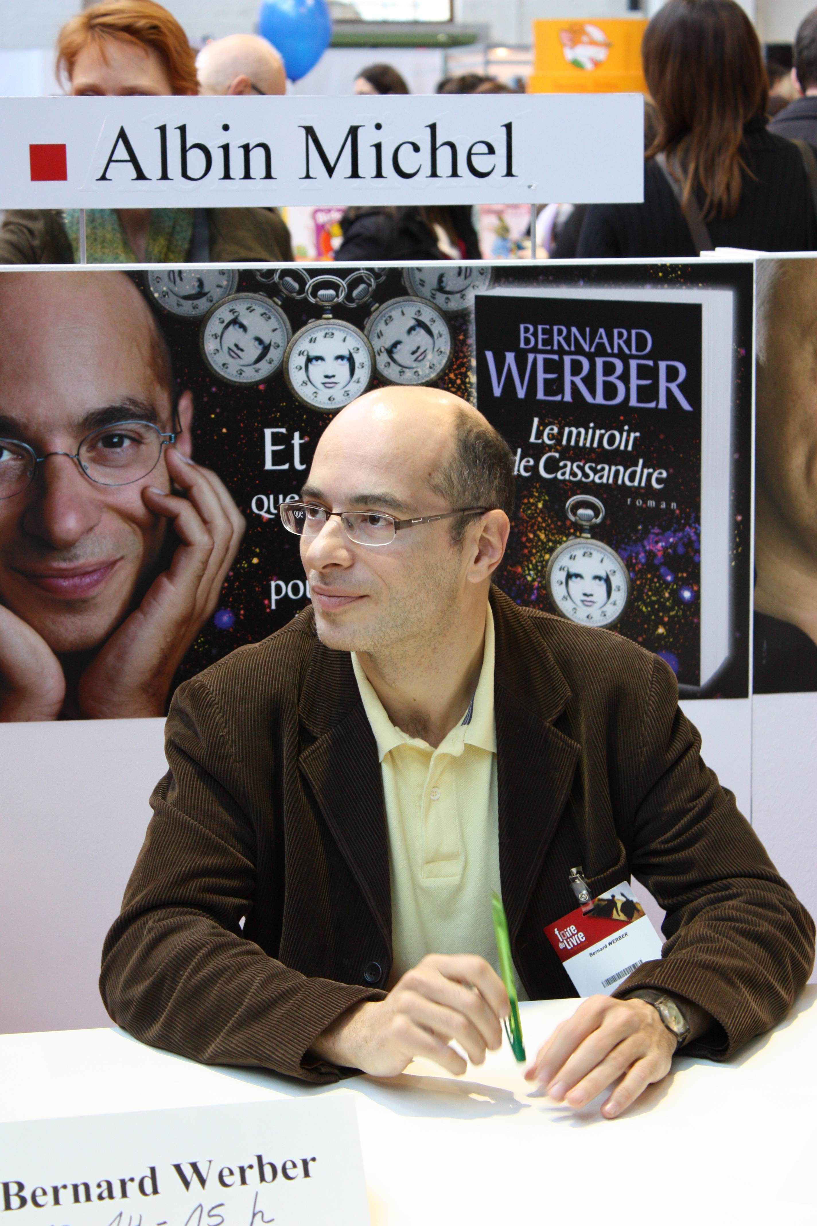 Bernard Werber durant une séance de dédicace lors de l'édition 2010 de la Foire du Livre de Bruxelles.